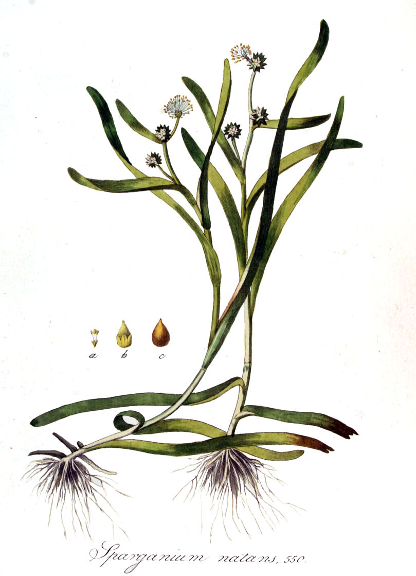 Sparganium natans L., kleinste egelskop